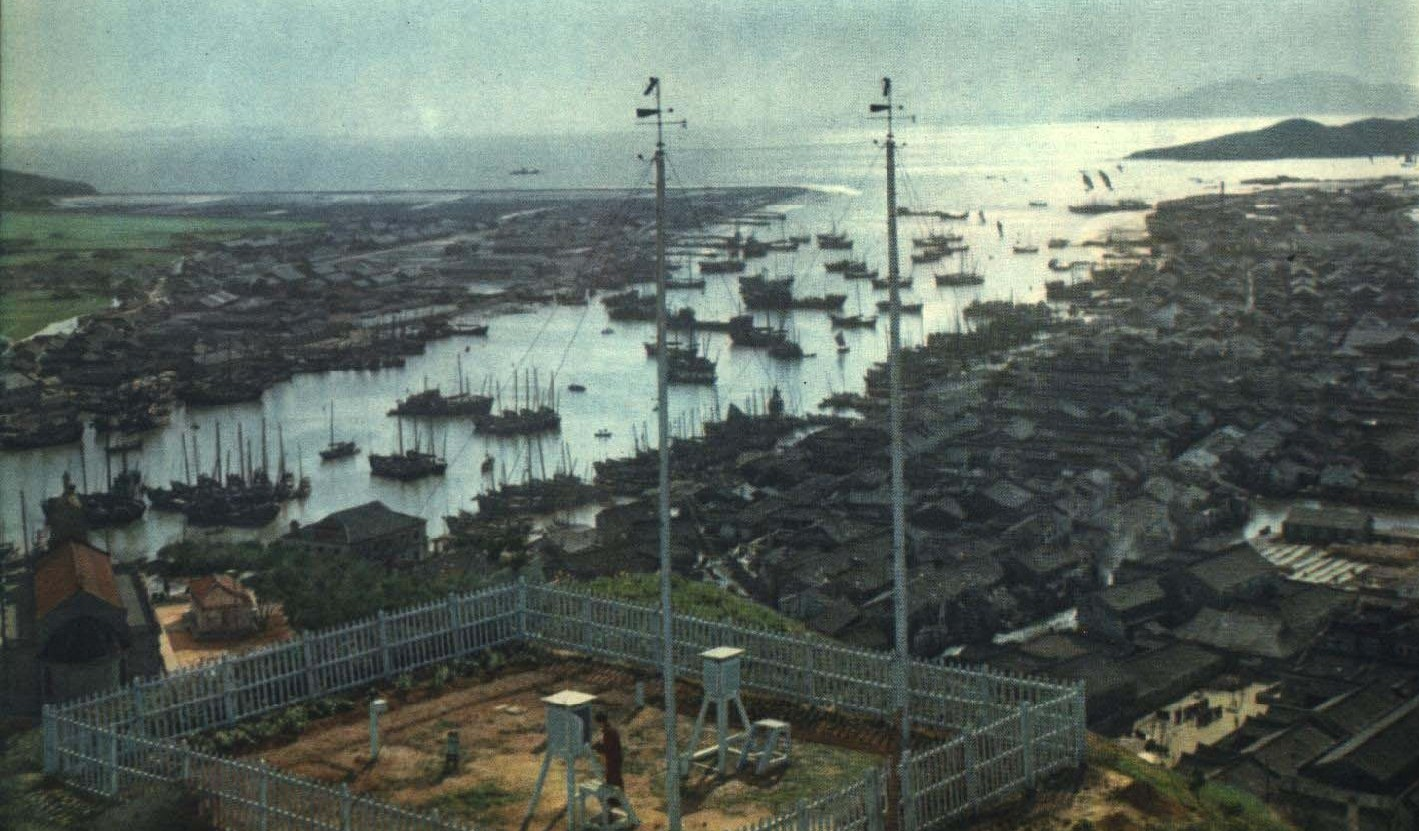 1963-05 1963年 舟山群岛气象站